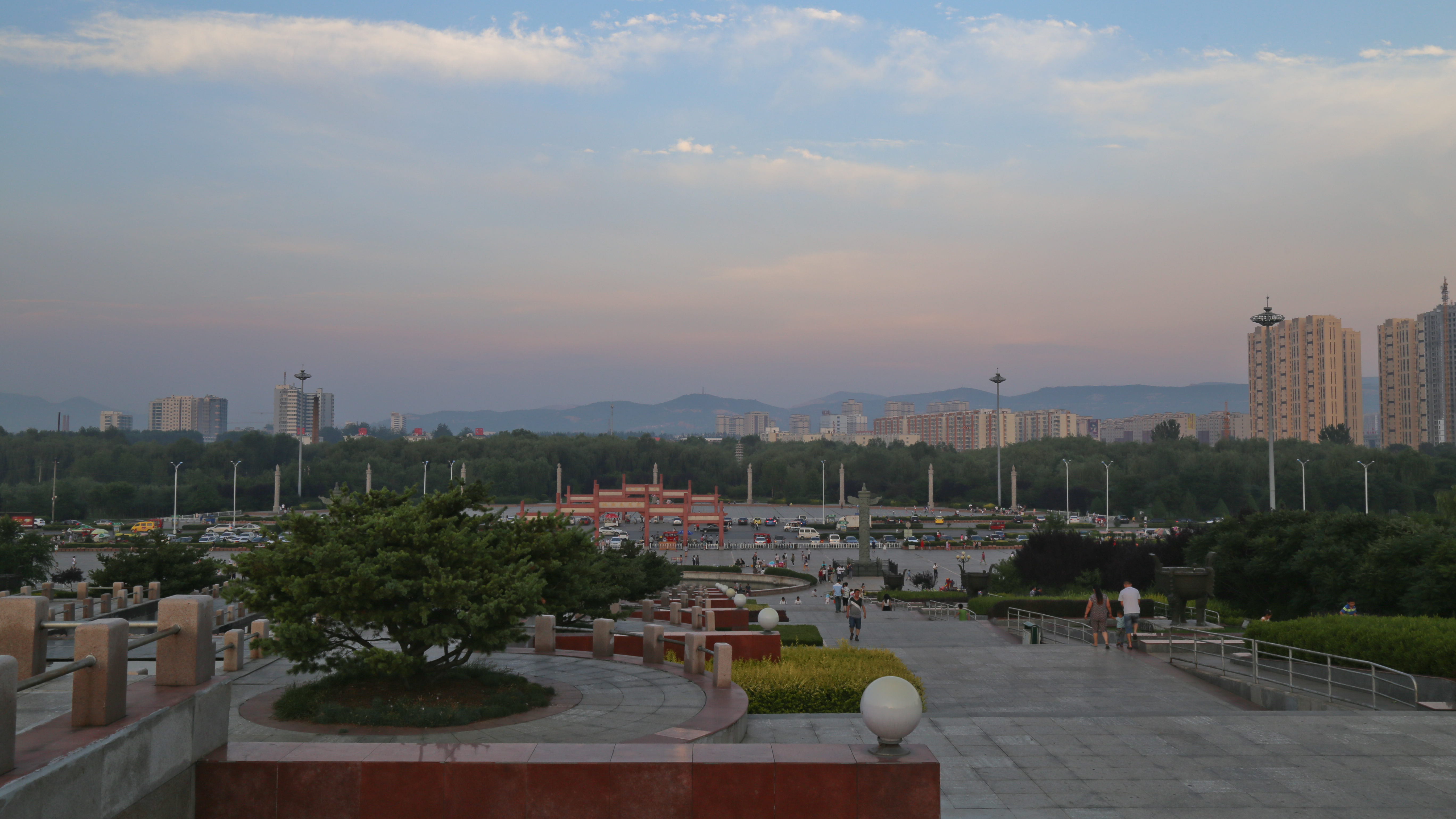 长治街景